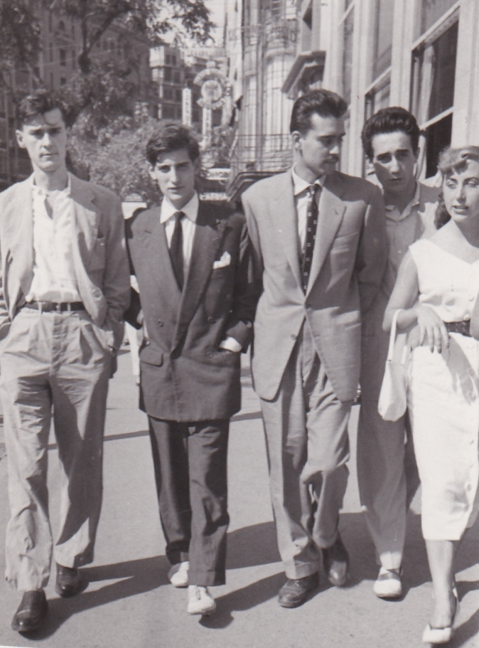 Jose Antonio Garcia-Blanco Peinador (izq.) con el pintor valenciano Ignacio Lorente Tallada y su hermano Enrique, en Valencia en 1955